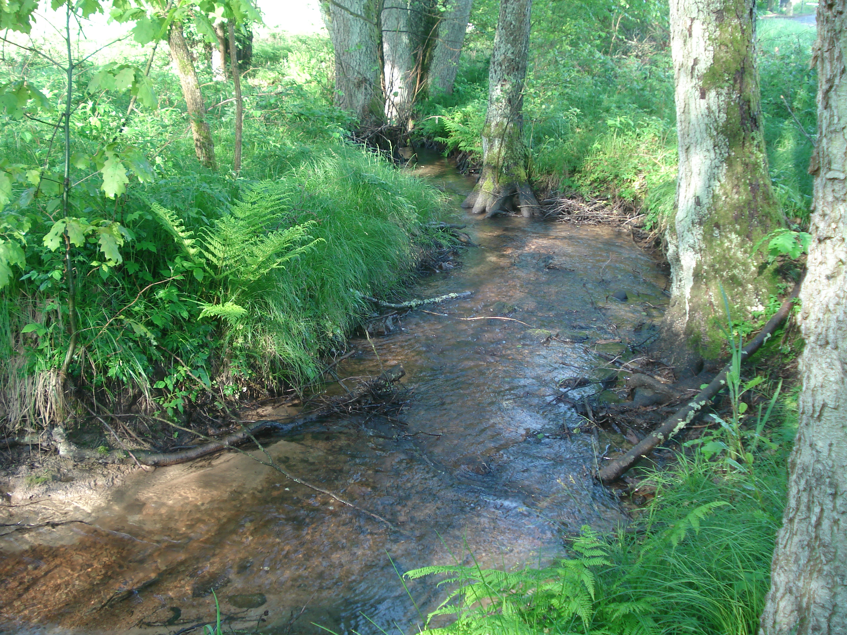 Der Krebsbach am Schloss Mespelbrunn